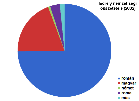 Erdély lakosságának nemzetiségi összetétele a 2002-es népszámlálás adatai alapján